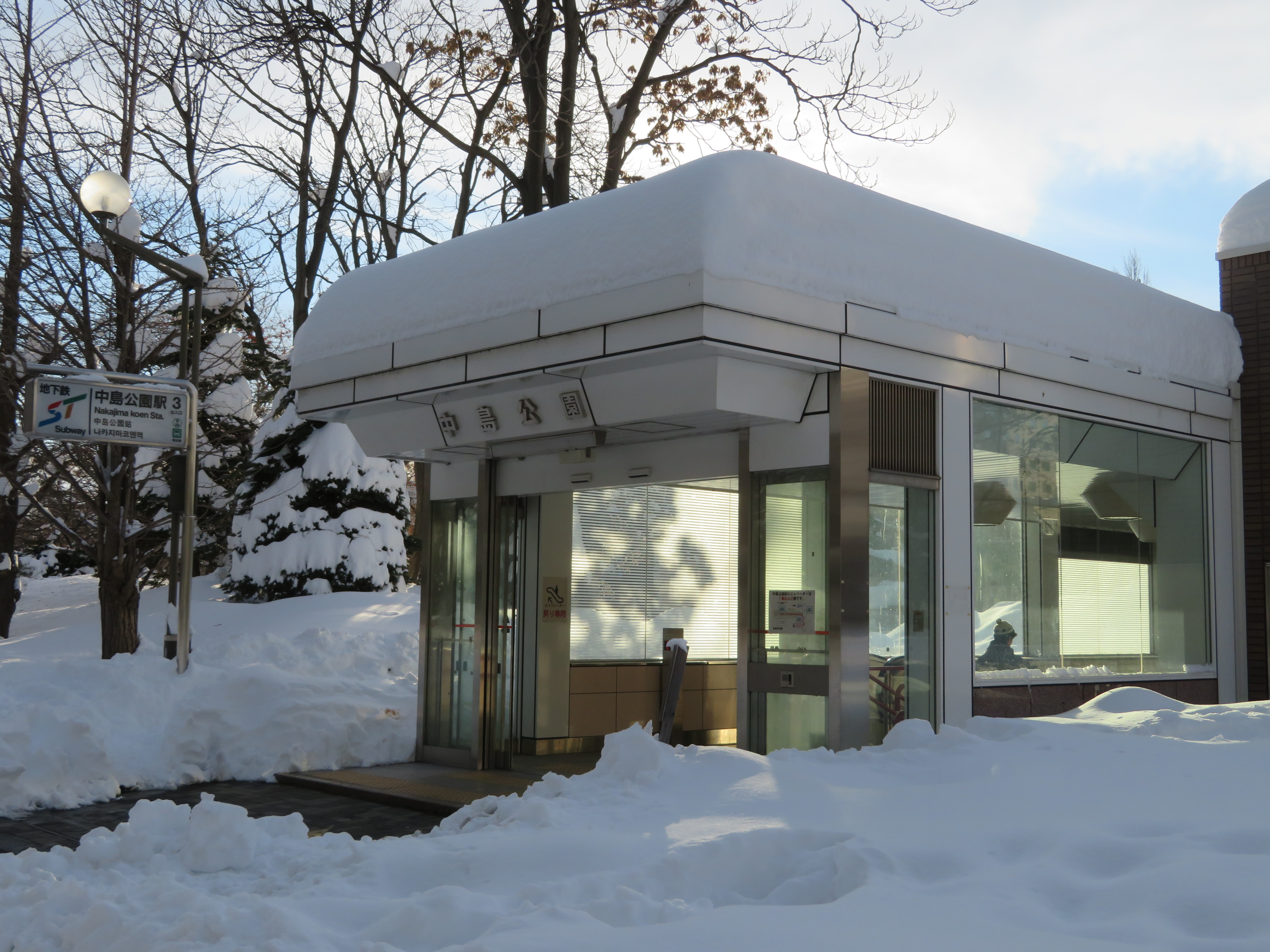 中島公園駅3番出入口